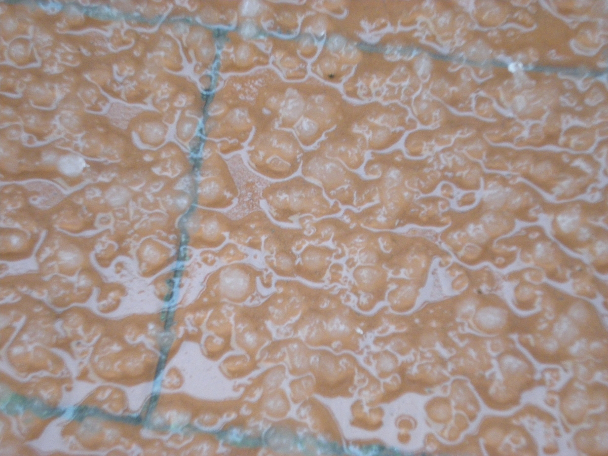 Gragnola (small hail) caduta a febbraio a Empoli